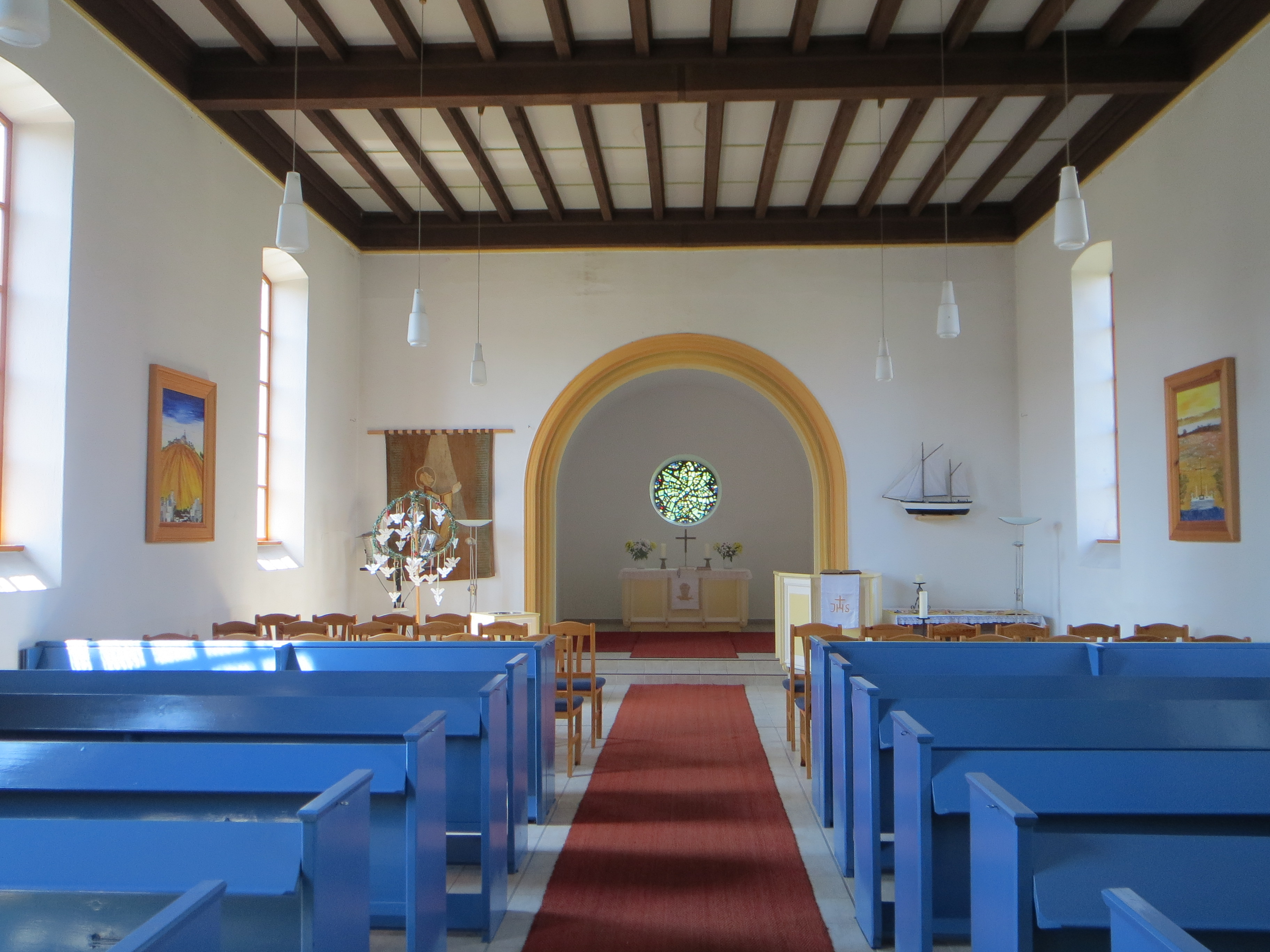 Kirche Mönkebude